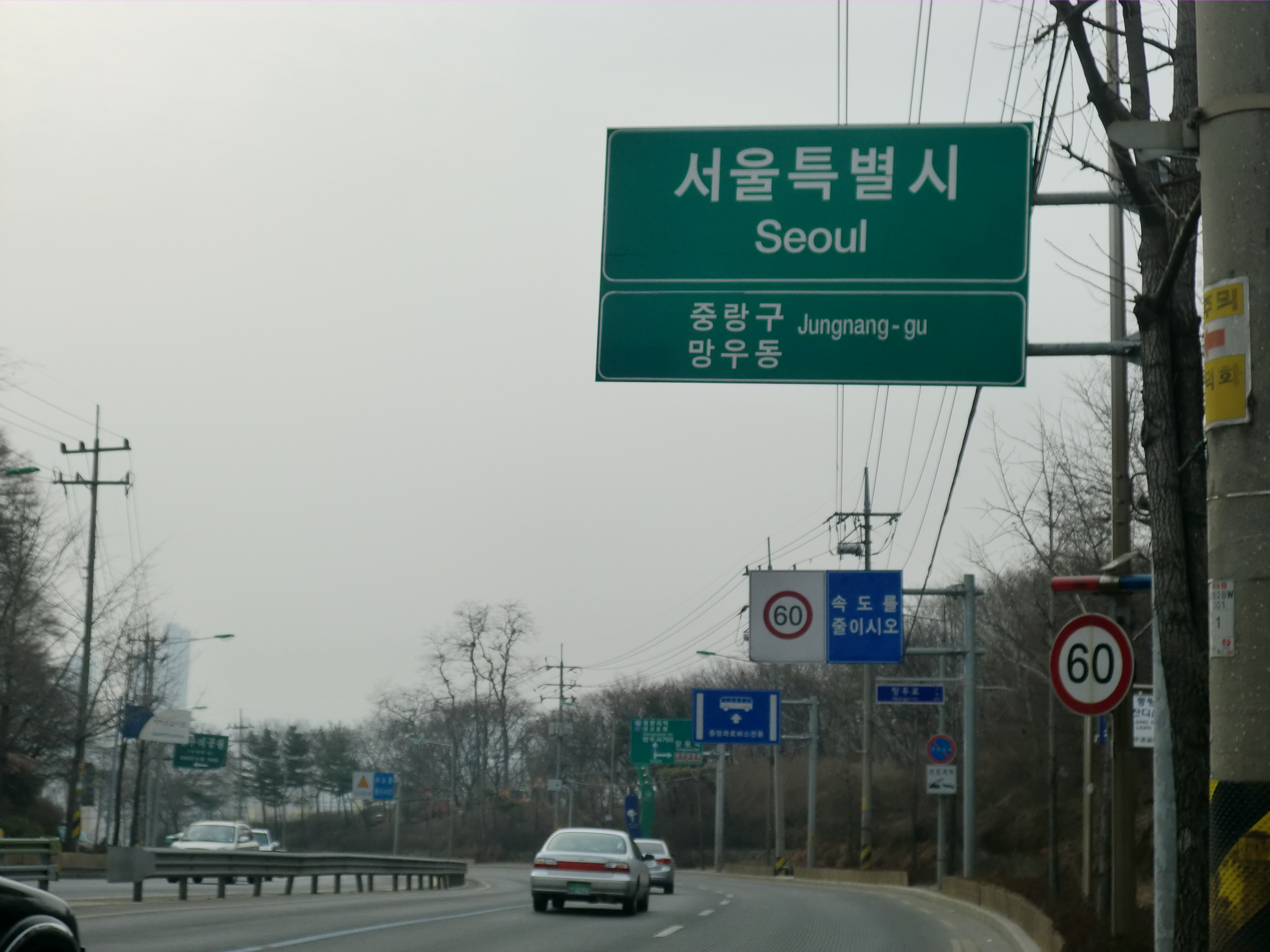 국도6호선에 있는 경기도 구리시와 서울특별시 중랑구의 경계